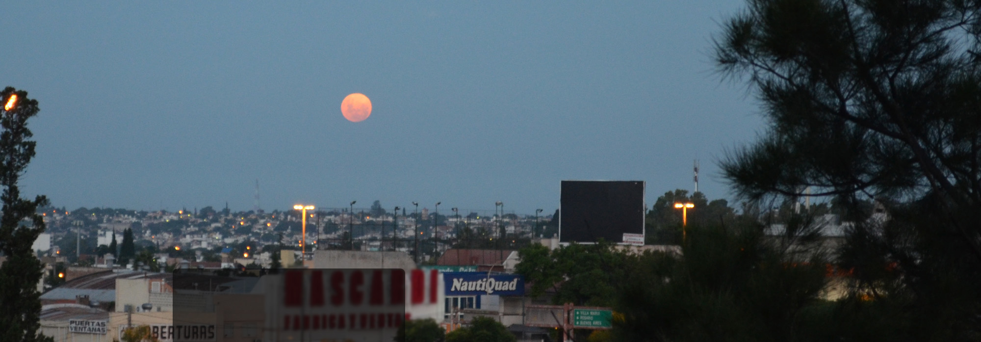 Ciudad de córdoba, donde se aprecian los barrios del Este, vistos desde el Parque Sarmiento. Al atardecer con la Luna.